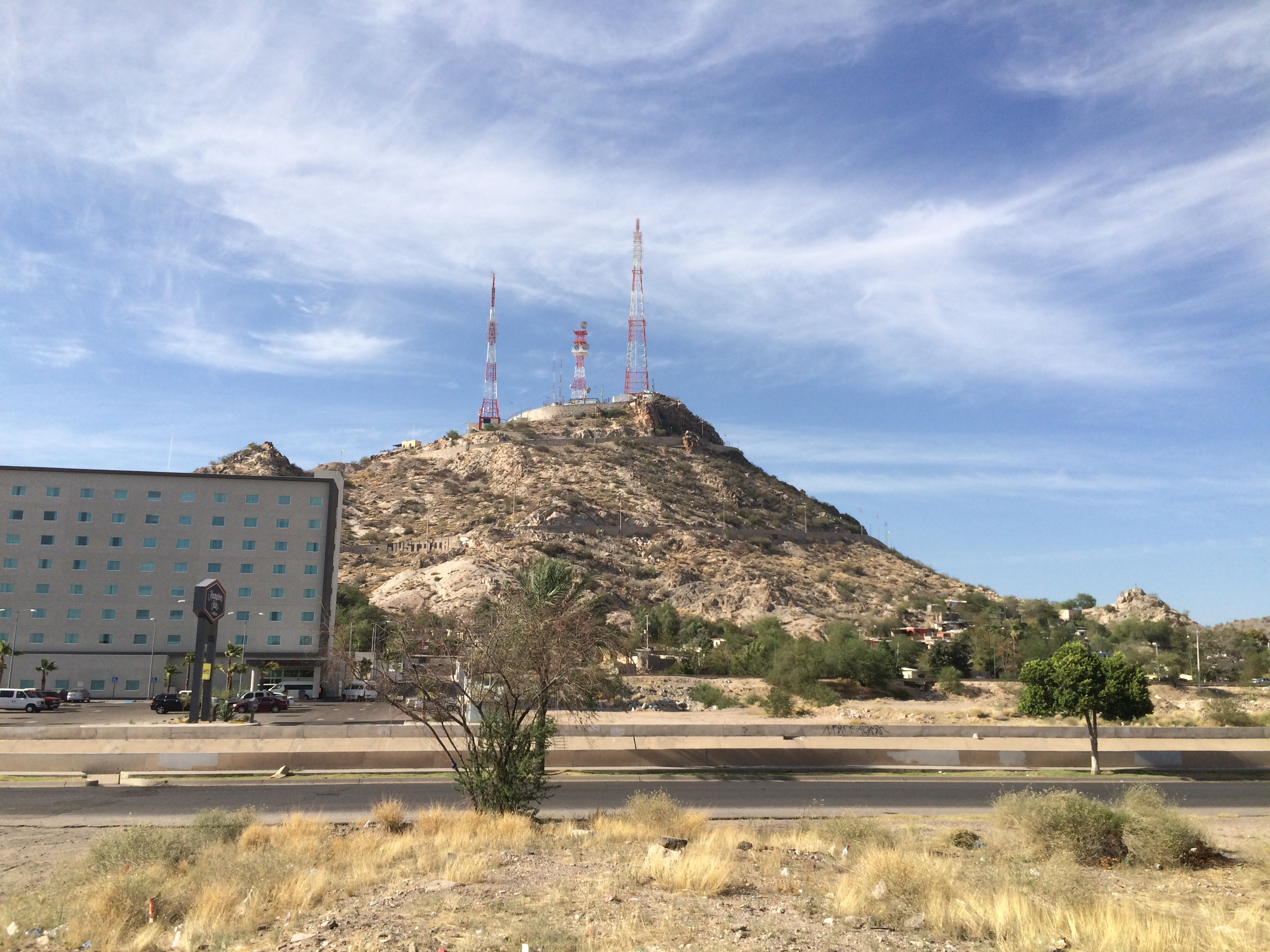 Cerro de la Campana en Hermosillo, Sonora, México.